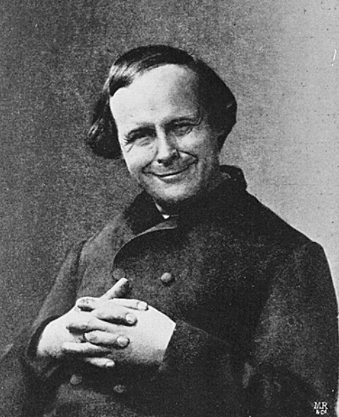 Vier Temperamente. Tafel mit Fotografien Nr. 86-89 (F. Möller; 1895). Abdruck in: Das Atelier des Photographen. Zeitschrift für Photographie und Reproduktionstechnik. Hrsgg. von A. Miethe. IV. Jahrgang 1897. Dresden: SLUB 19 4 04663